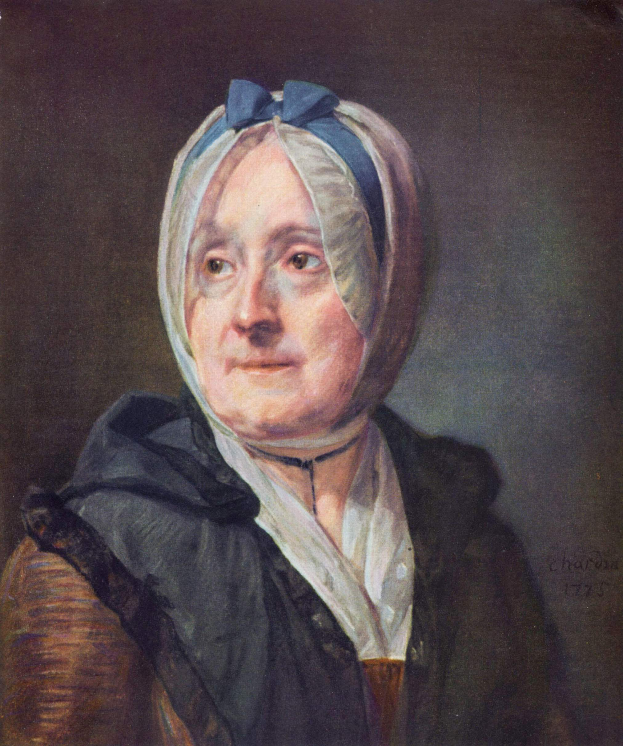 Portrait de Françoise Marguerite Pouget, deuxième femme de l'artiste